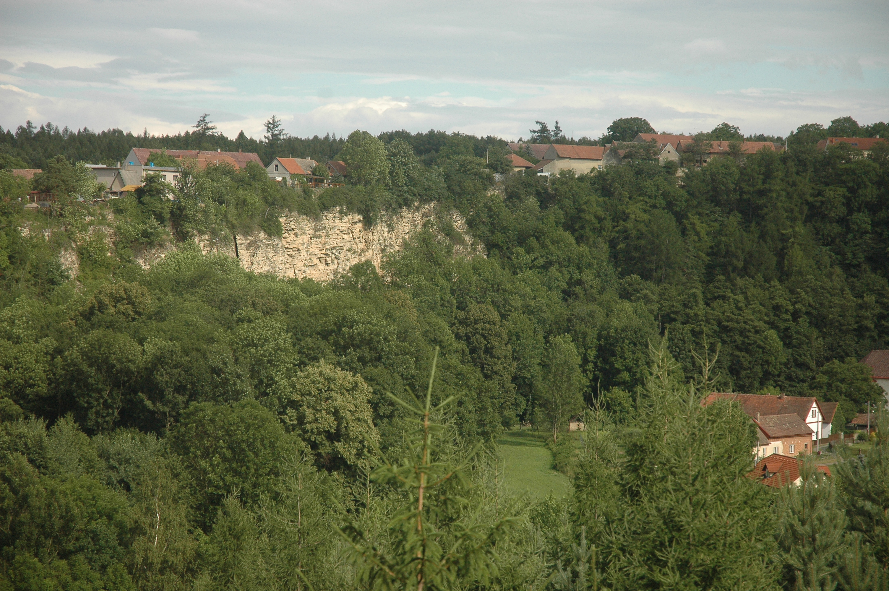 Natural Monument Podskala, near Chrudim Town